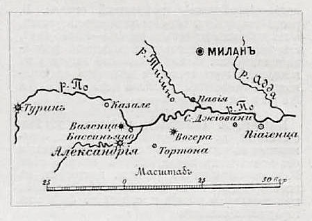 Данное изображение было использовано в статье «Бассиньяно» опубликованной в четвёртом томе «Военной энциклопедии», который был издан книгоиздательским товариществом Ивана Дмитриевича Сытина в 1911 году в столице Российской империи городе Санкт-Петербурге.